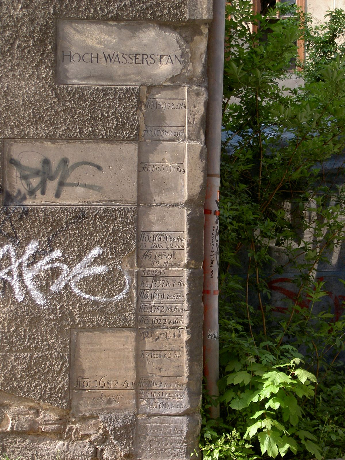 Halle an der Saale, Wasserstandsmarken an einer alten Muehle [Neumühle, Mühlpforte 5: zwischen Domberg und Moritzburg in einer Senke nahe der einstigen Mühlpforte gelegen, älteste der ehemals fünf Mühlen im Bereich der Mühlpforte, erbaut 1582, zweistöckiger Putzbau, 1769 und 1840 Um- und Ausbauten, teils in Fachwerk, an der Südostecke Hochwasserstandsmarken; Quelle